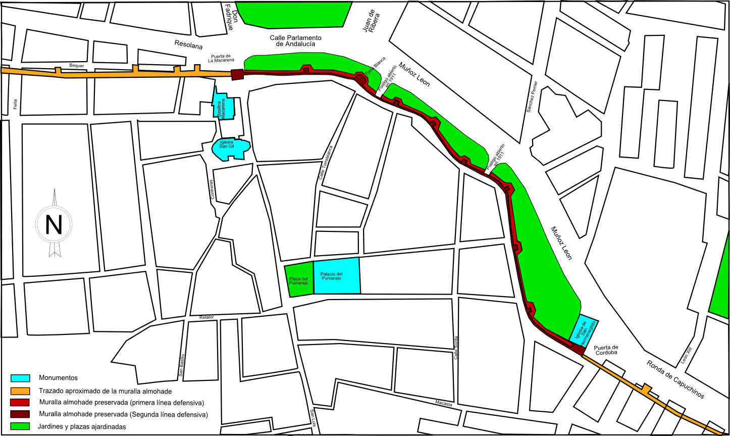 Plano del tramo de las murallas de Sevilla preservado en la Macarena